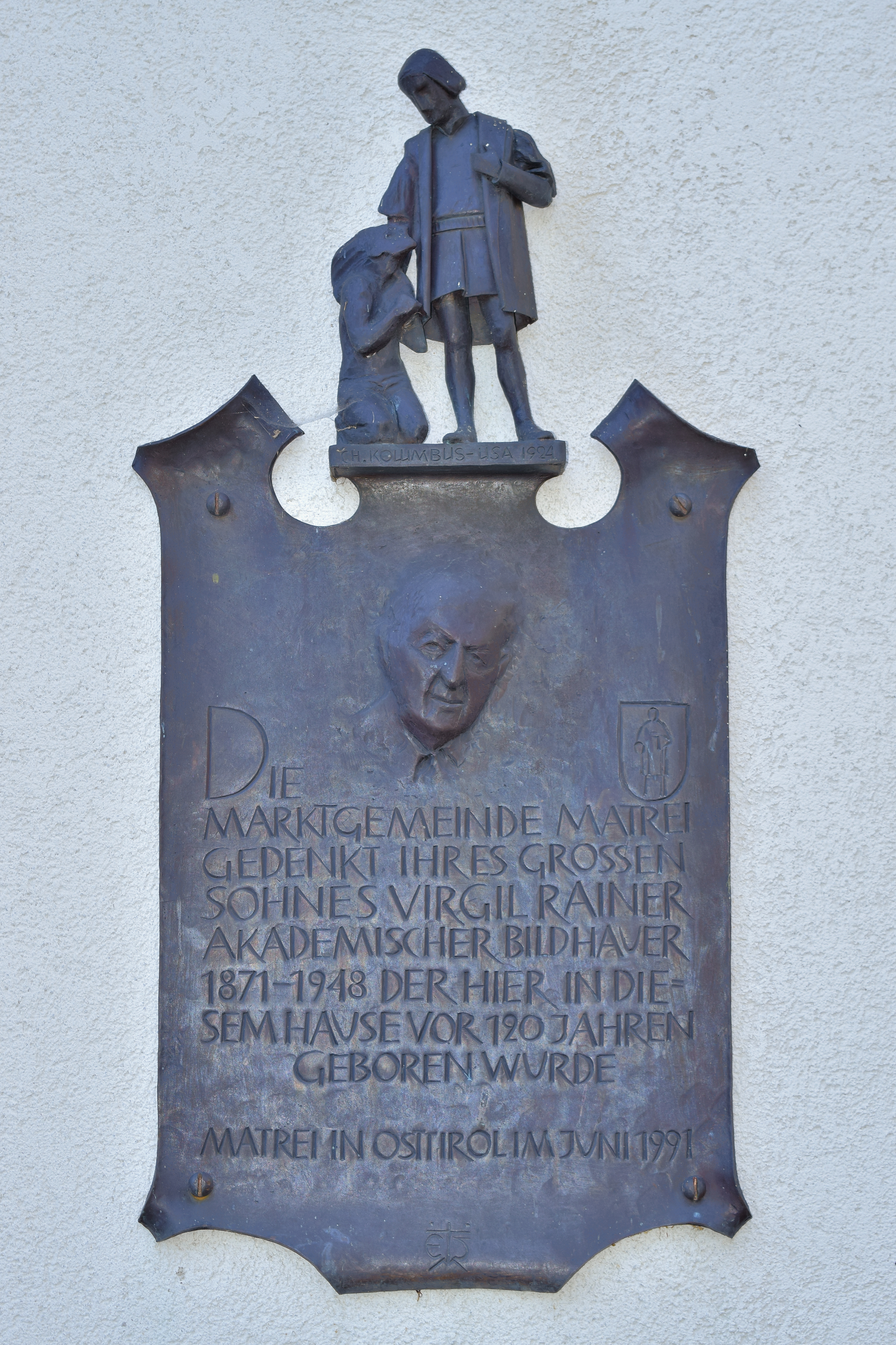 Gedenktafel für den Bildhauer Virgil Rainer, der am Bauernhof Messner geboren wurde.